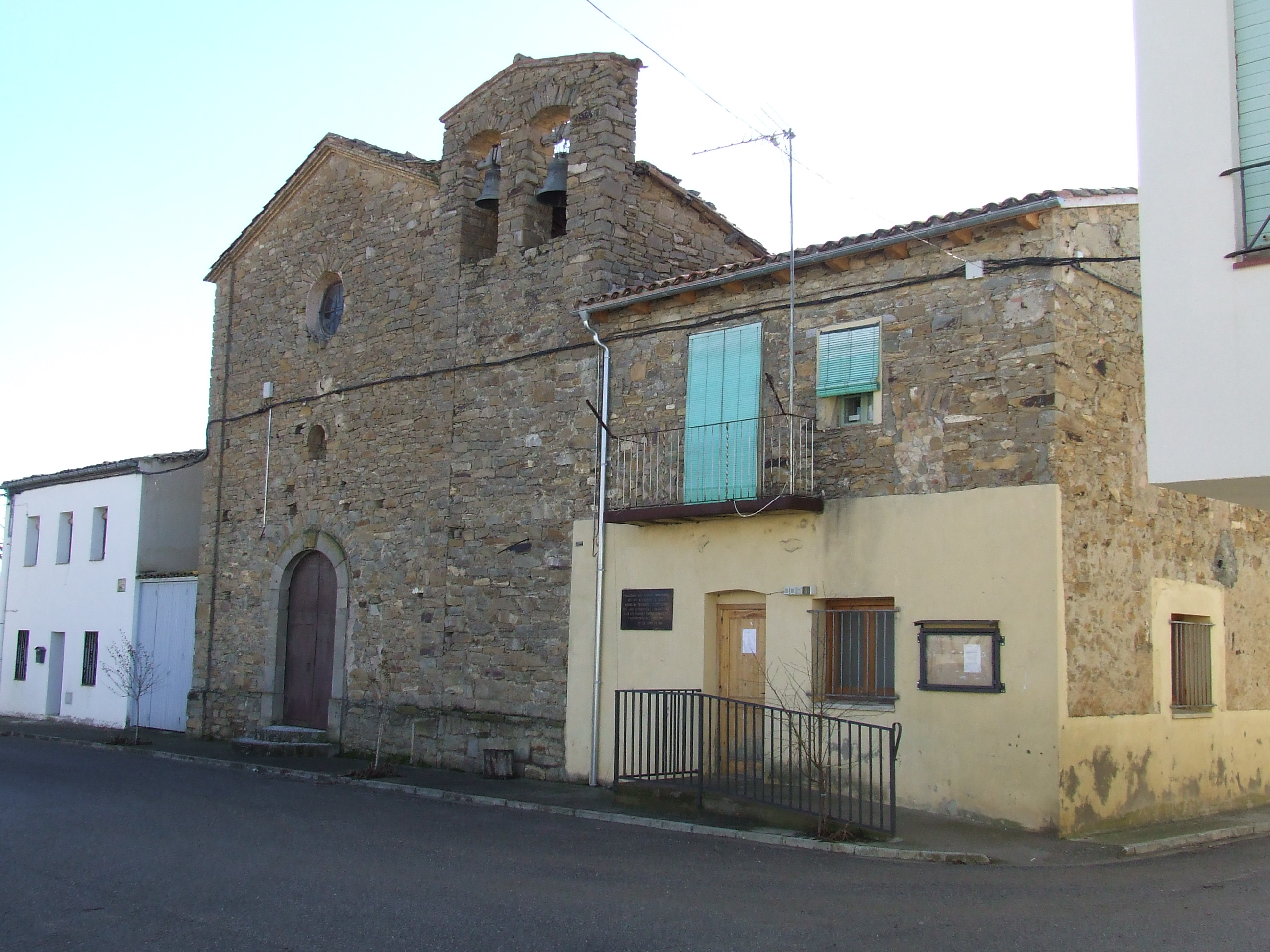 L'església de sant Martí de Puigcercós (Palau de Noguera, Tremp, Pallars Jusà)